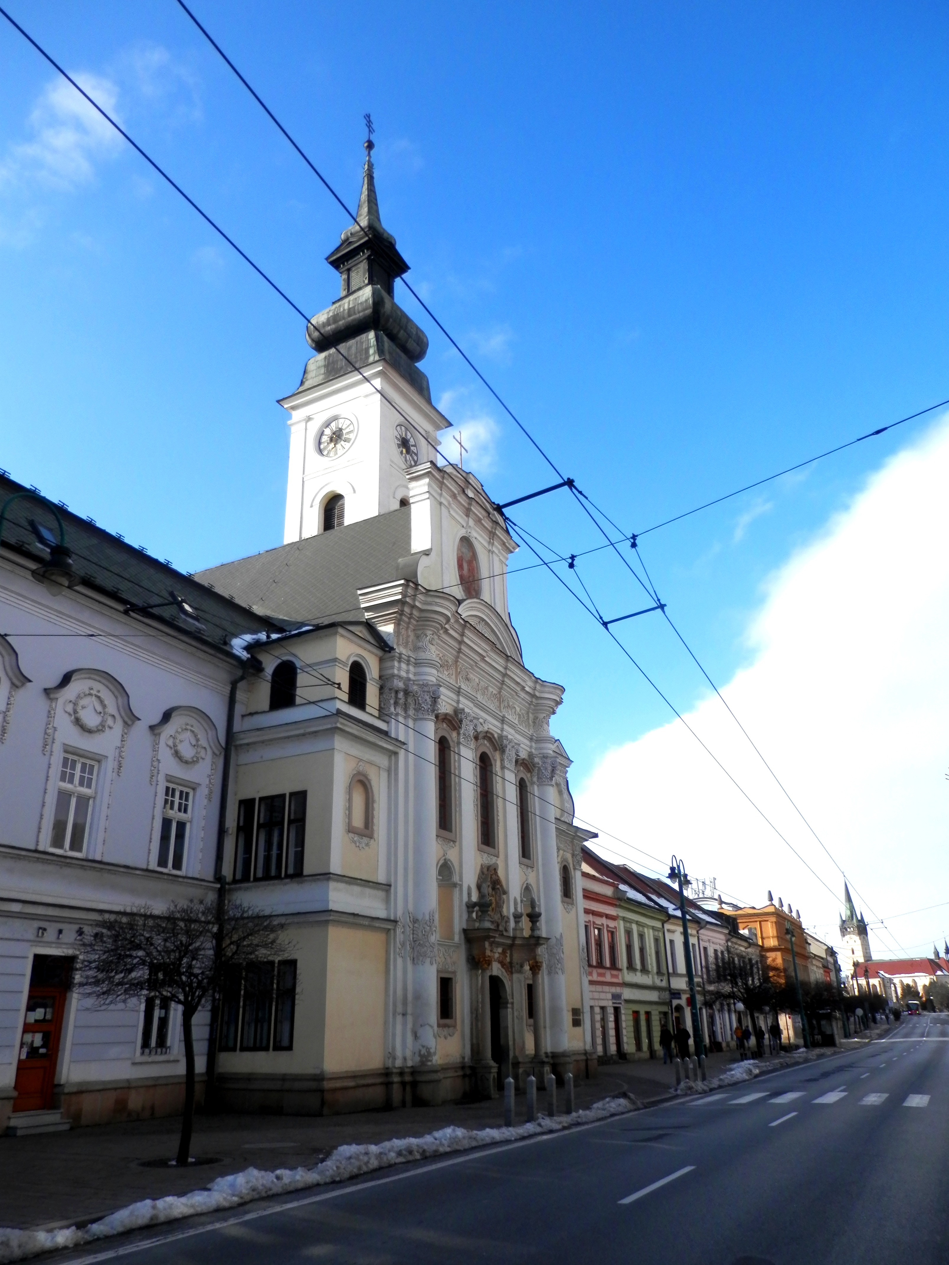 Katedrála sv. Jána Krstiteľa, mesto Prešov. Slovensko.